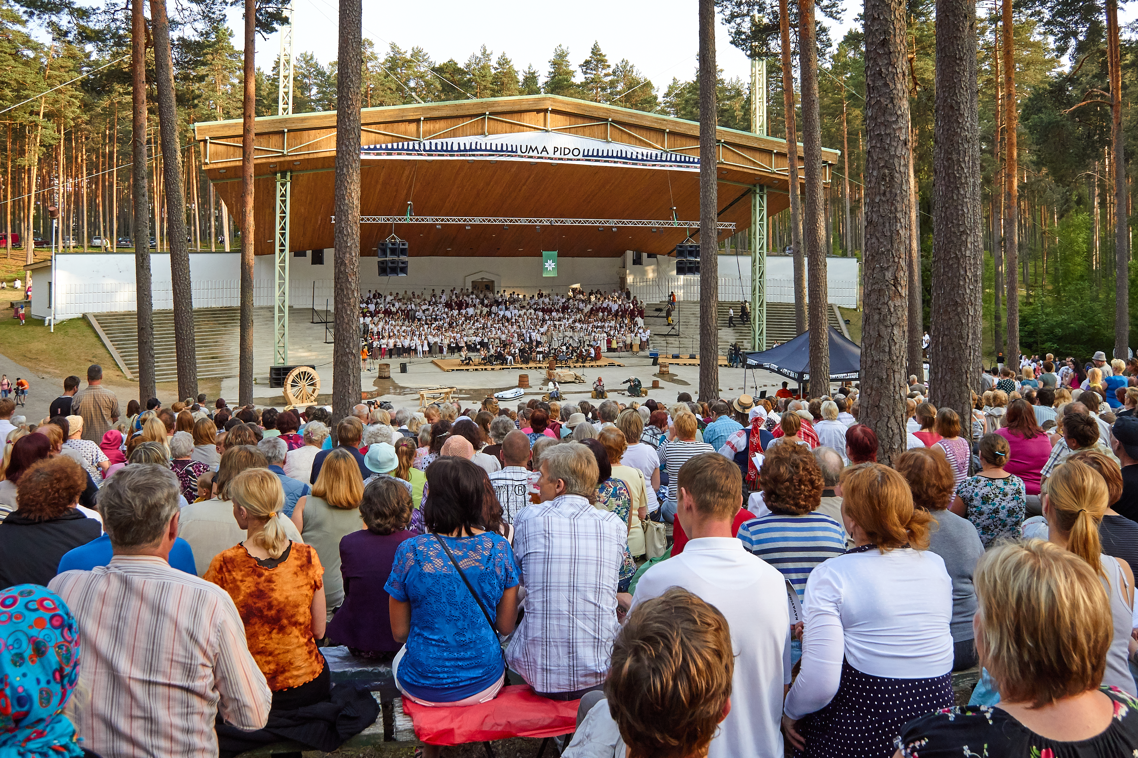 3. Uma Pido Võrus Kubija laululaval 2013. aasta juunis.